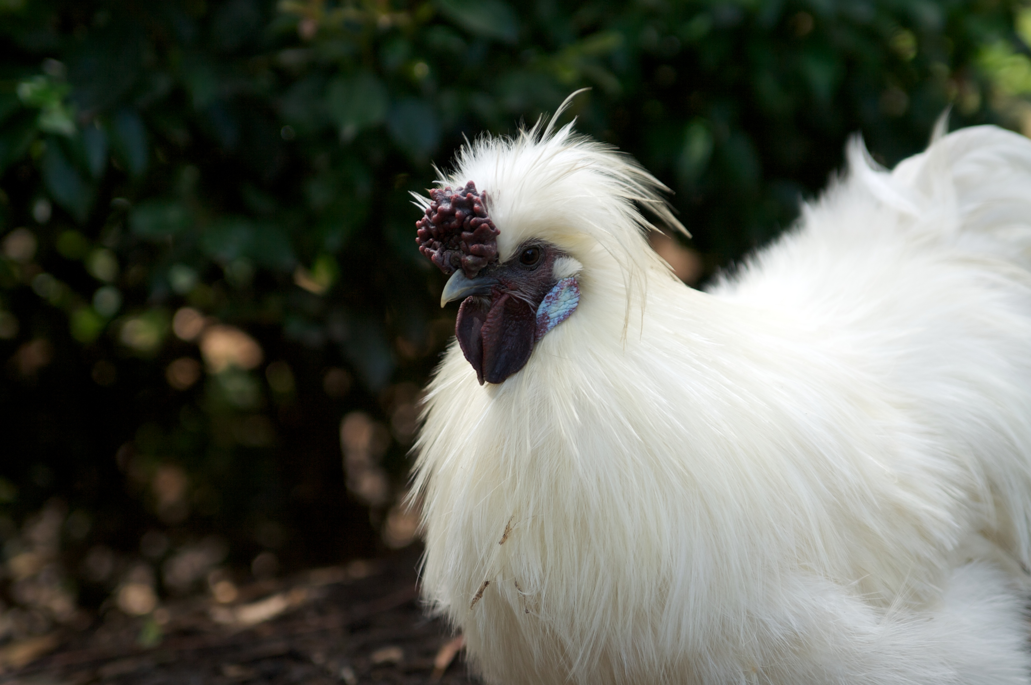 A Silkie bantam rooster in Australia. See also Image:Silkie rooster in Aus.jpg